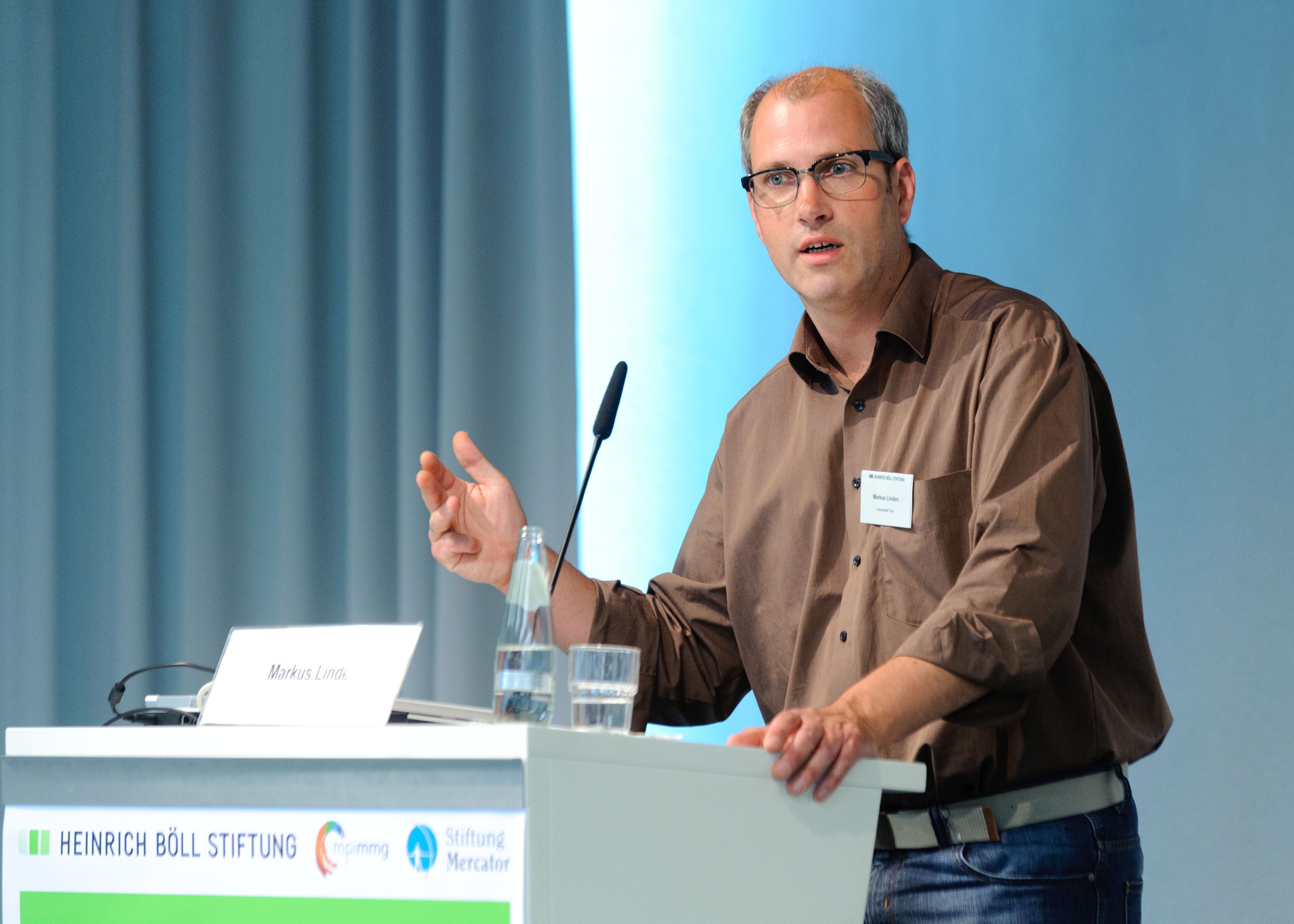 Dr. Markus Linden (Politikwissenschaftler, Uni Trier) Foto: Stephan Röhl